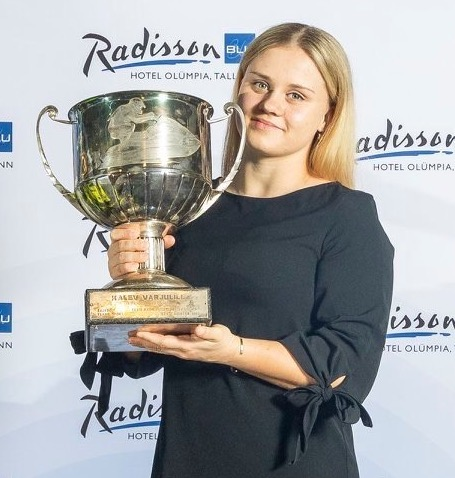 Jasmiin Üpraus